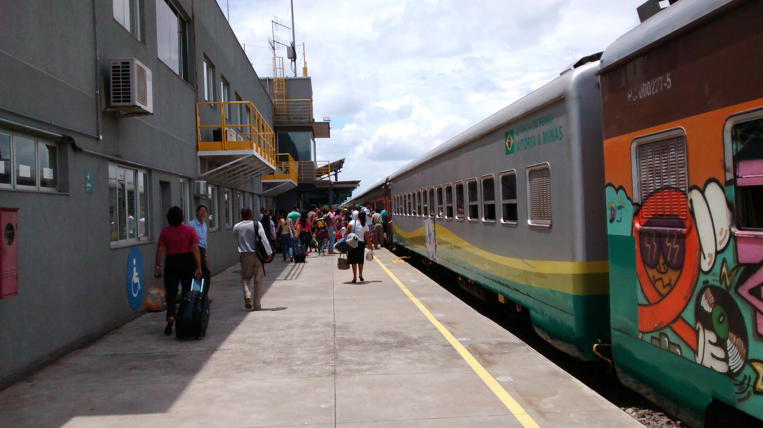 Usiminas, Ipatinga - MG, Brazil